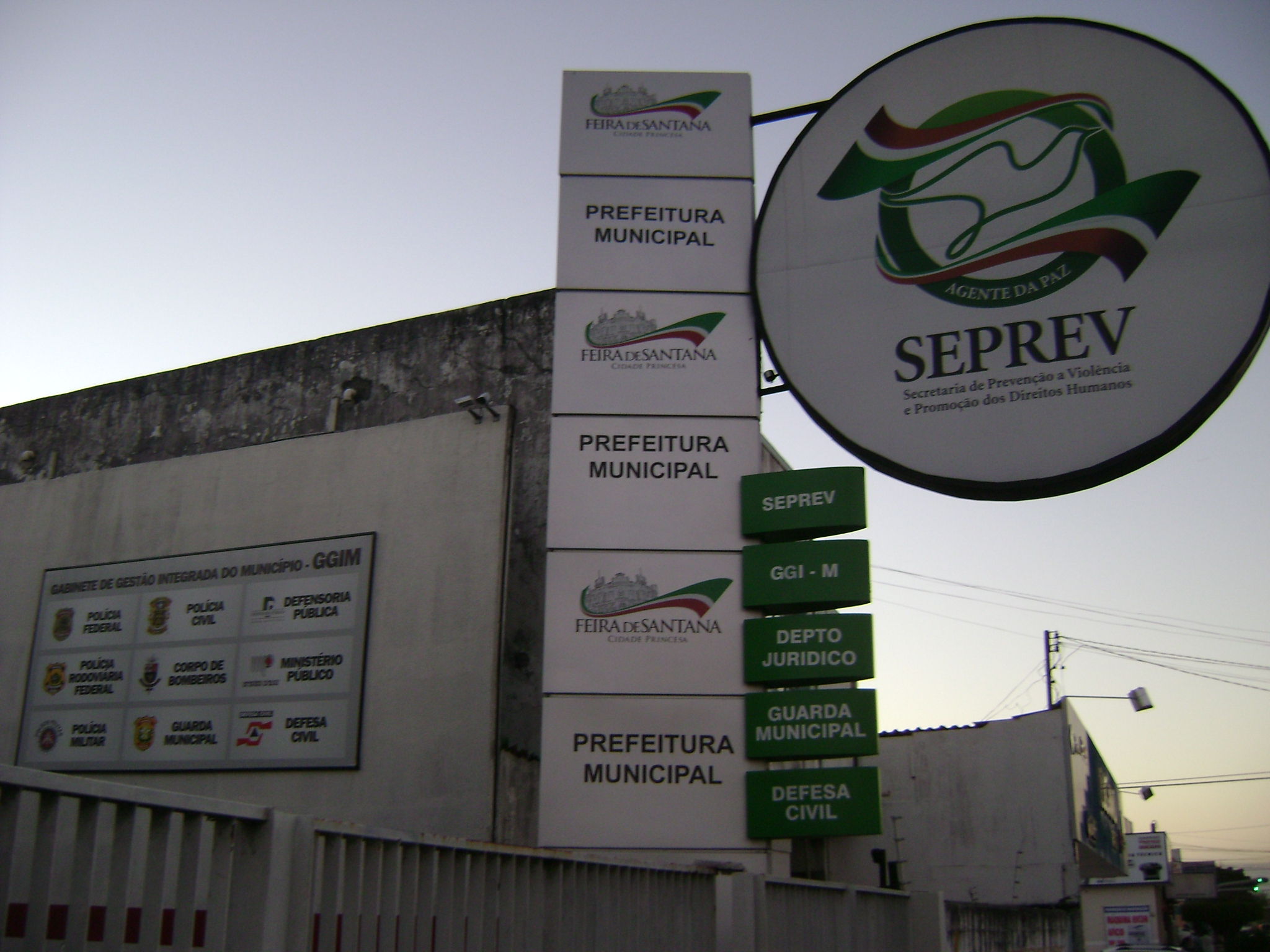 Entrada do SEPREV em Feira de Santana, Bahia, Brasil.